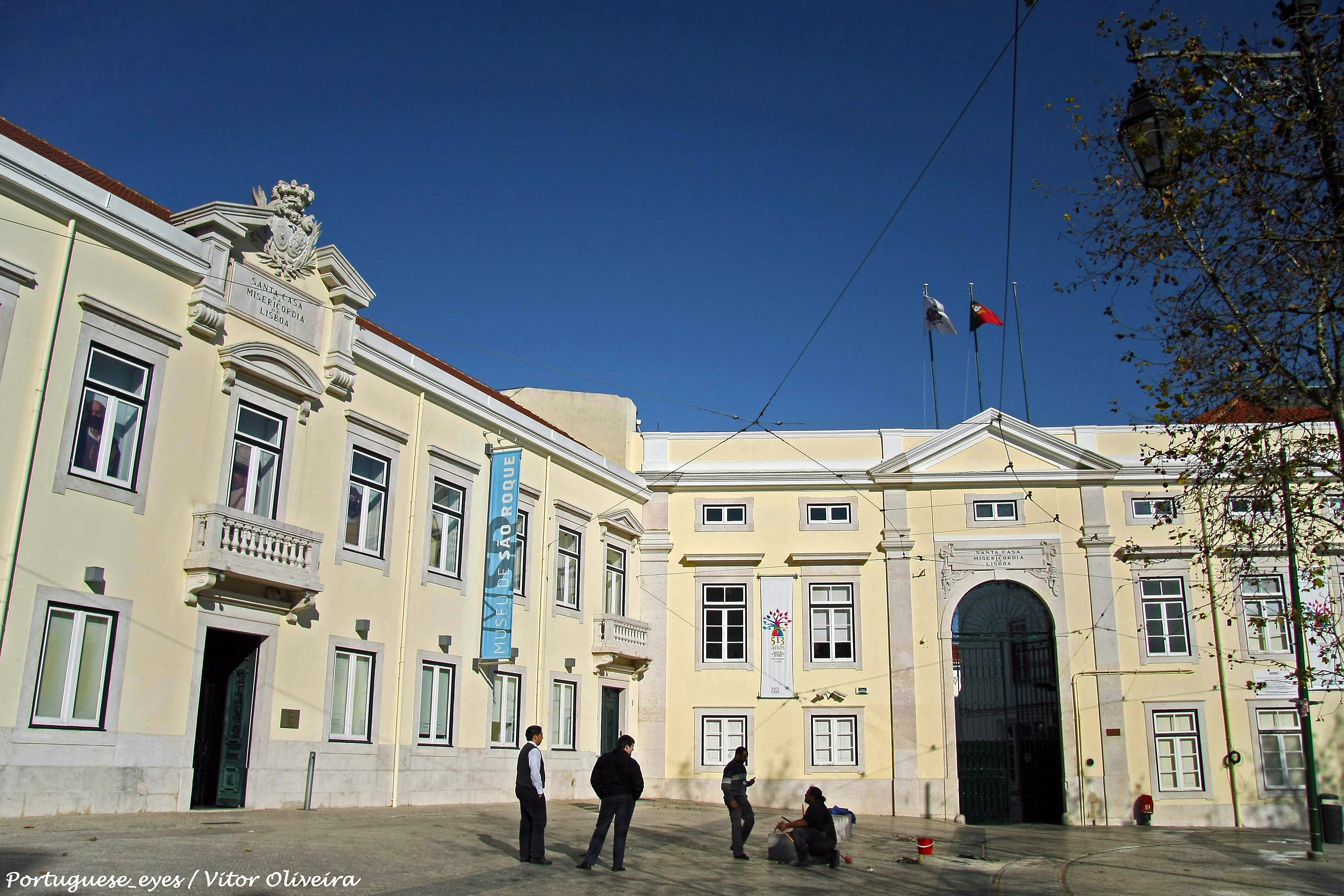 O Museu de São Roque foi um dos primeiros museus de arte a serem criados em Portugal. Abriu ao público em 11 de Janeiro de 1905, com a designação de Museu do Thesouro da Capela de São João Baptista, em evocação da importante colecção de arte italiana que esteve na origem da sua criação. Desde a sua abertura ficou instalado no edifício da antiga Casa Professa da Companhia de Jesus em Lisboa, espaço contíguo à Igreja de São Roque, que tinha sido doado à Santa Casa da Misericórdia de Lisboa em 1768, após a expulsão dos jesuítas. Ao longo do século XX foi objecto de várias remodelações que permitiram acompanhar as mudanças operadas no domínio da museologia. A remodelação mais profunda foi levada a cabo entre 2006 e 2008, permitindo ao museu ampliar e duplicar a sua área de exposição permanente.